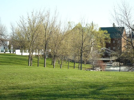 Coteau-Du-Lac, Québec